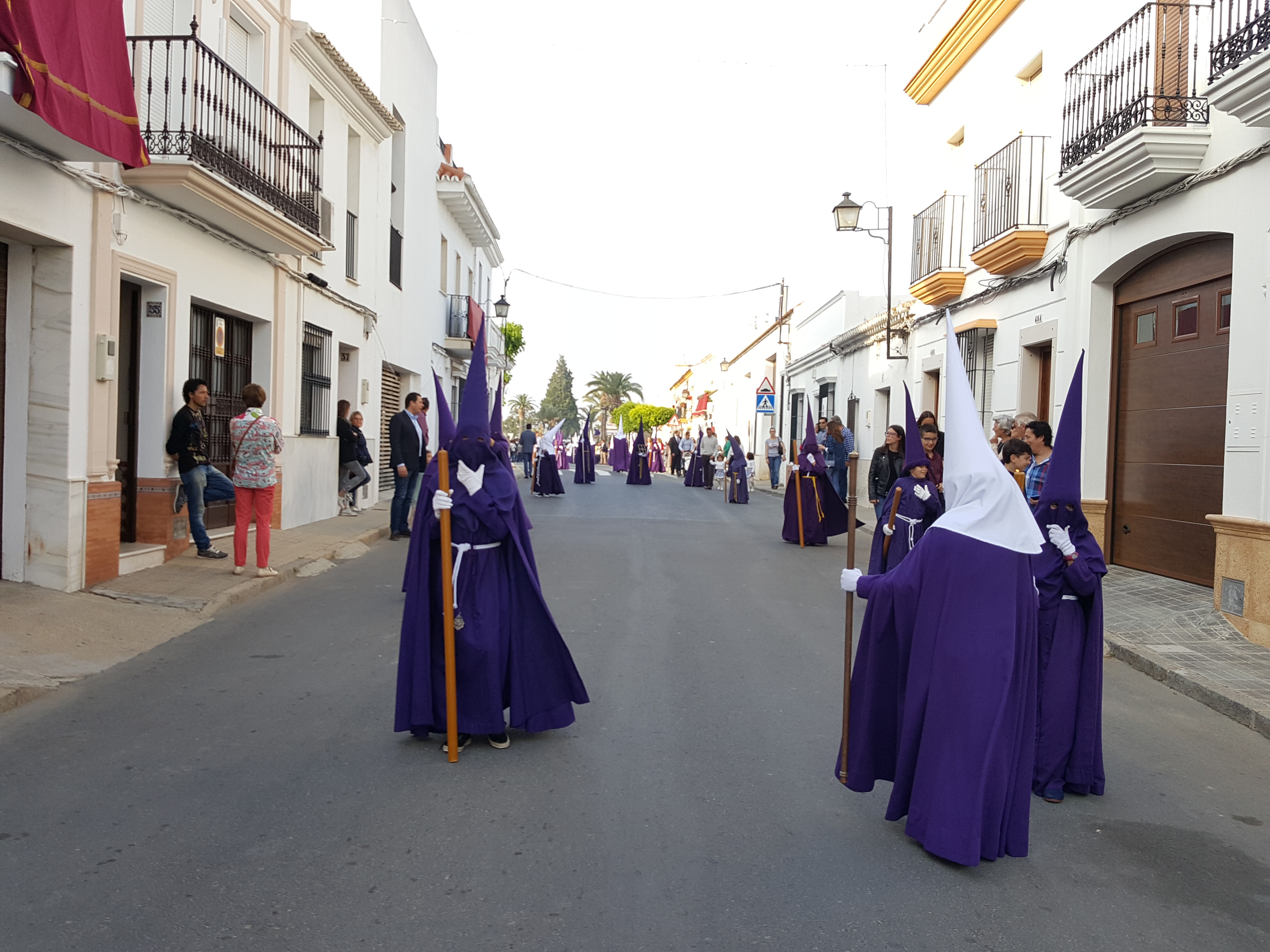 Hermandad de la Oración del Huerto. Desfile procesional del Jueves Santo. Vista del desfile procesional por el casco urbano de Moguer.